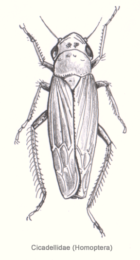 Homoptera - Cicadellidae sp.